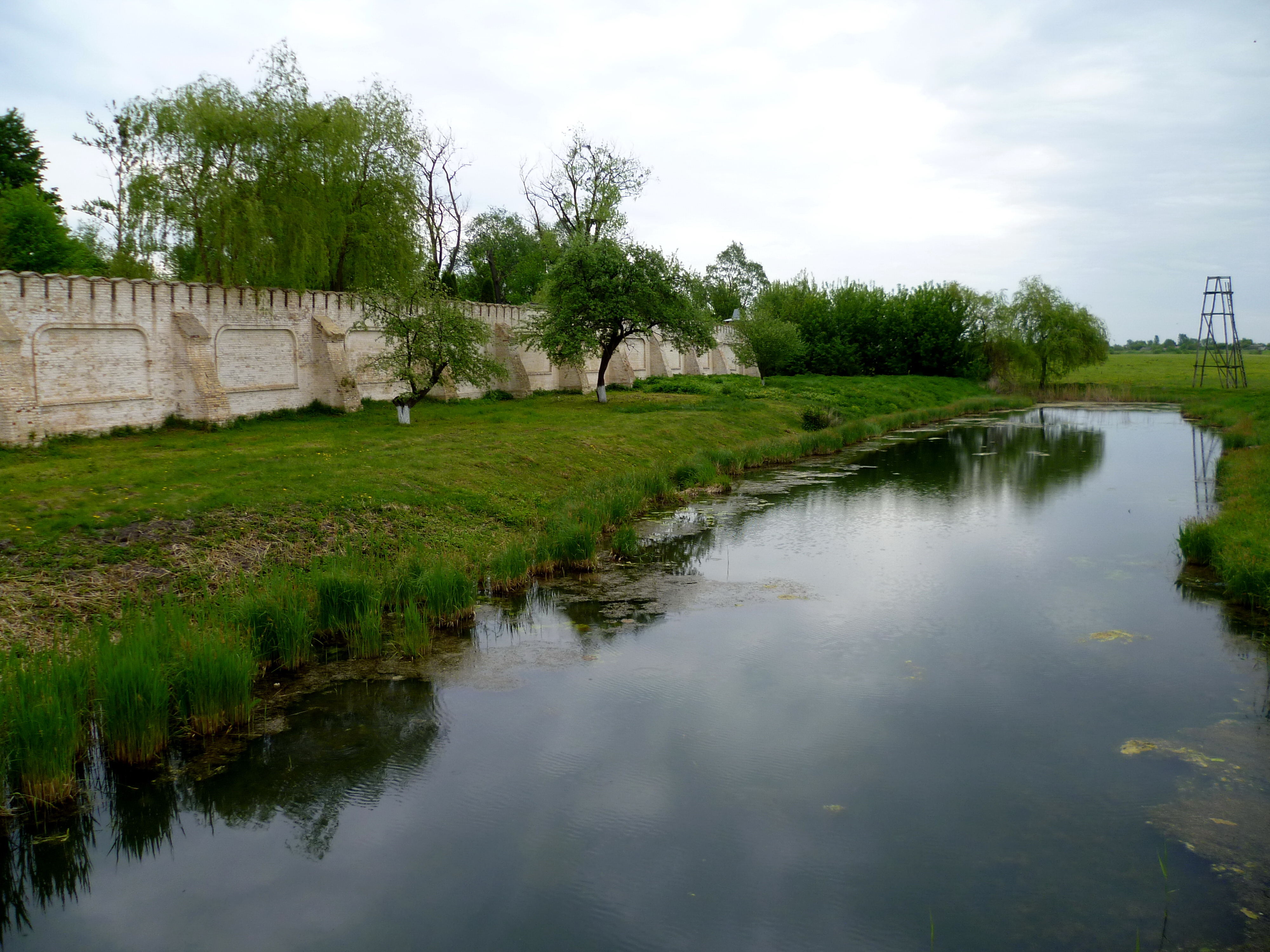 "Козацькі могили" - урочище заповідне болотне (Рівненська область, Радивилівський район, с. Пляшева. Пляшевська сільська рада. Площа 3,5 га) - перед входом на територію заповідника